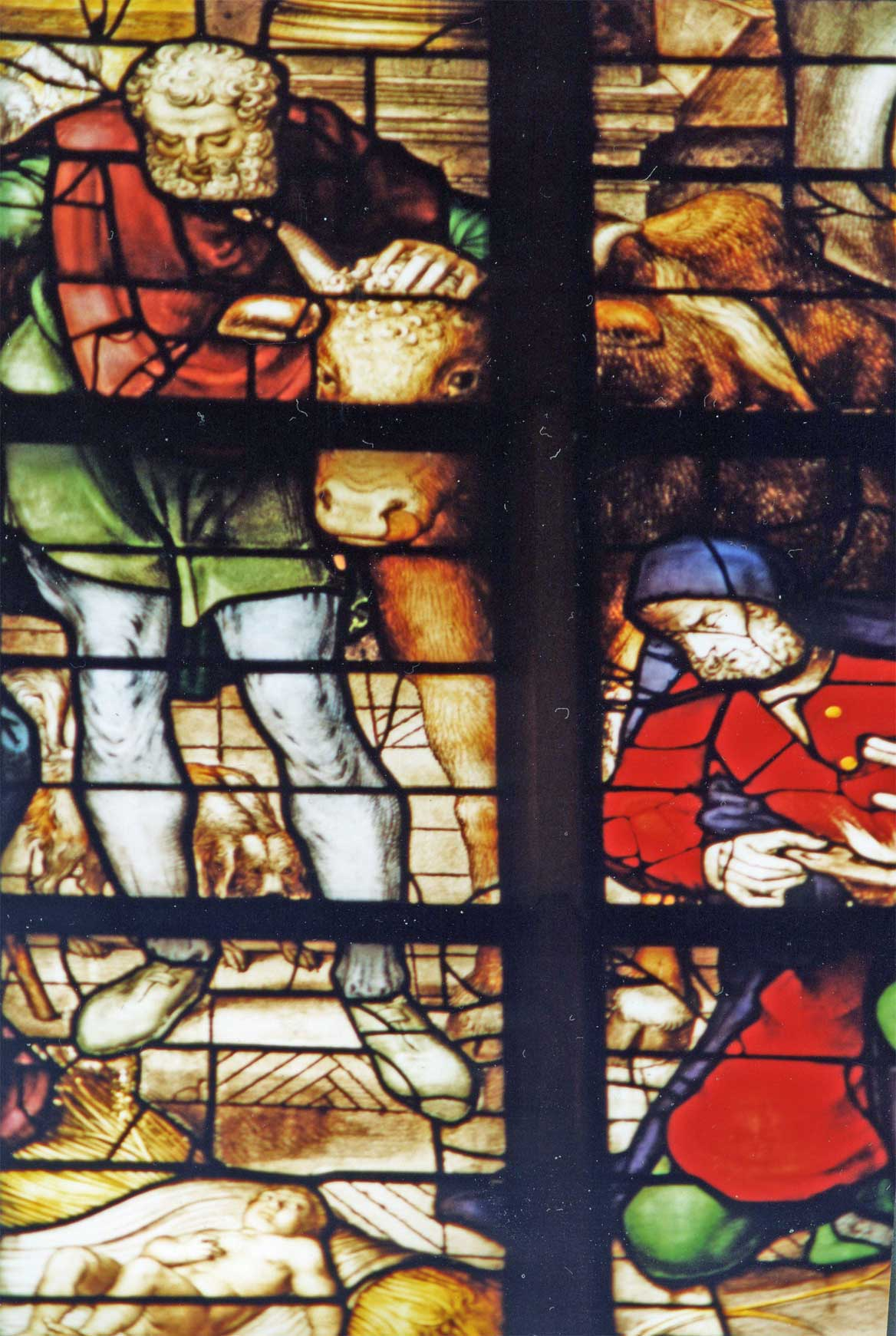 Fragment glas 12 St. Janskerk te Gouda : de geboorte van Jezus; maker Wouter Crabeth, 1564